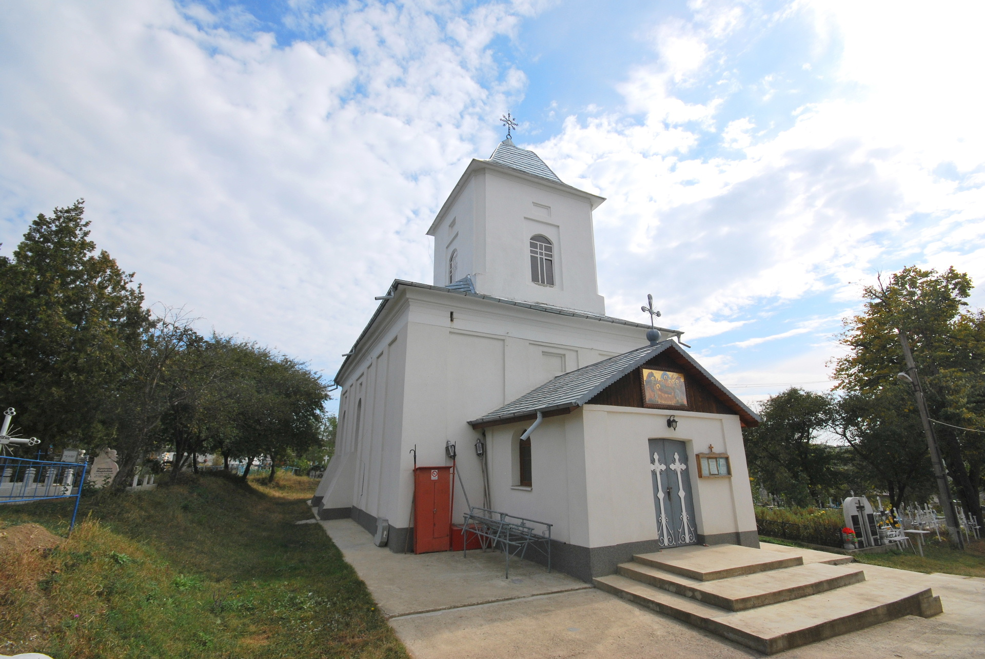 Biserica „Tăierea Capului Sf. Ioan Botezătorul”